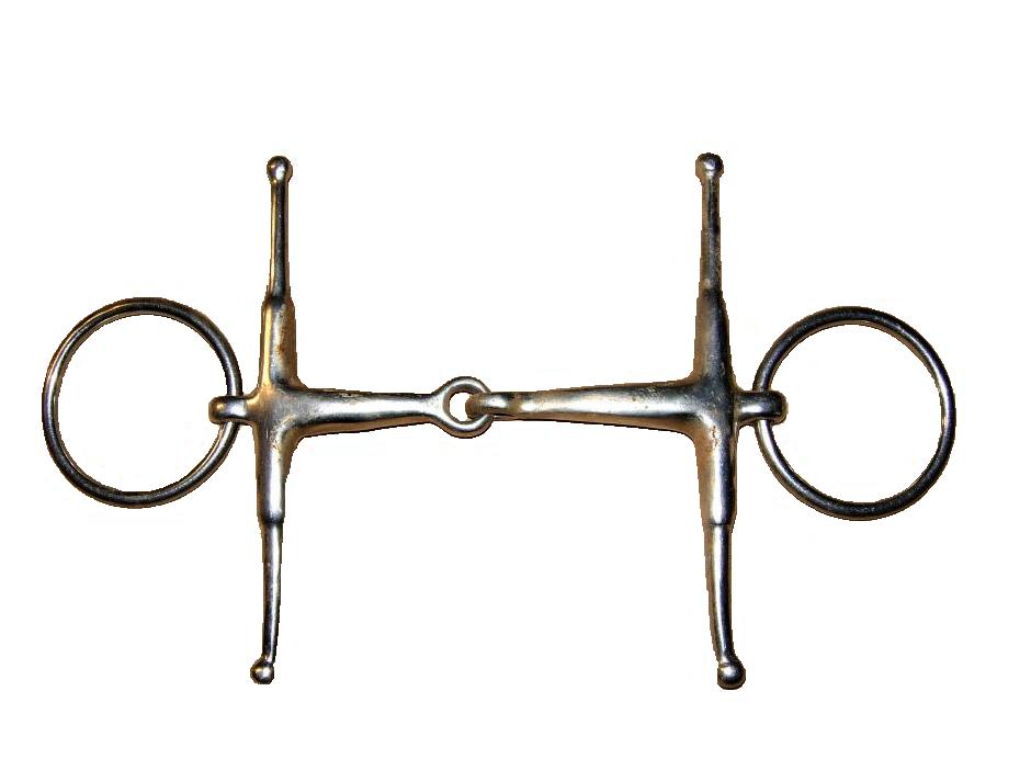 Fulmer snaffle bit